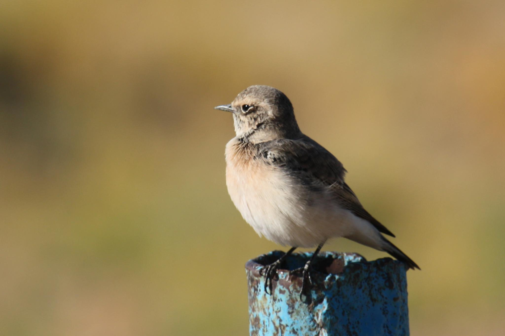 juvenile